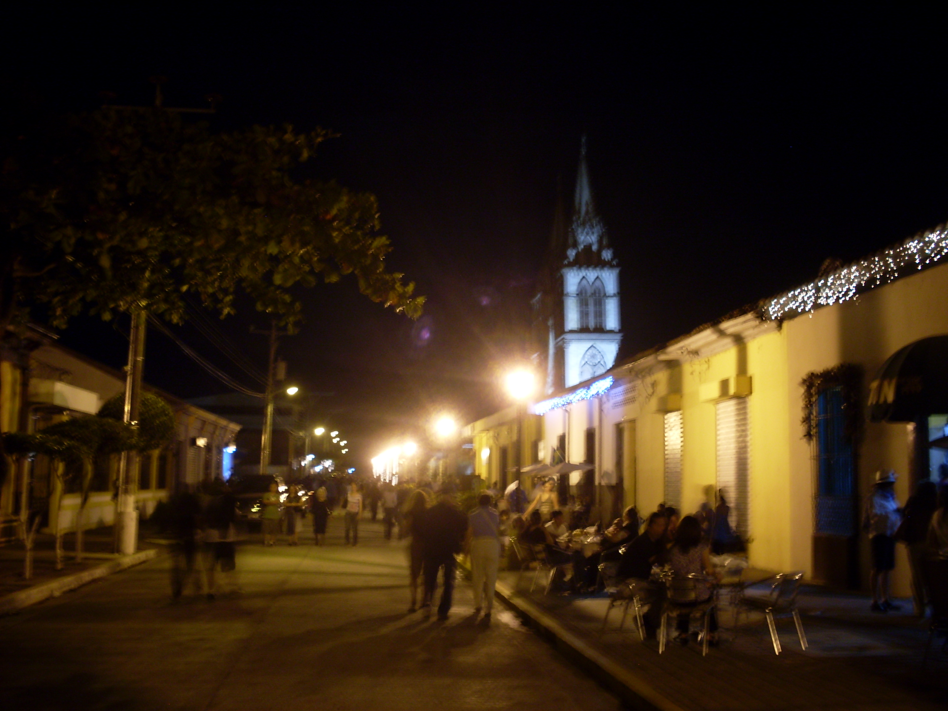 Paseo El Carmen de noche en Santa Tecla, El Salvador.